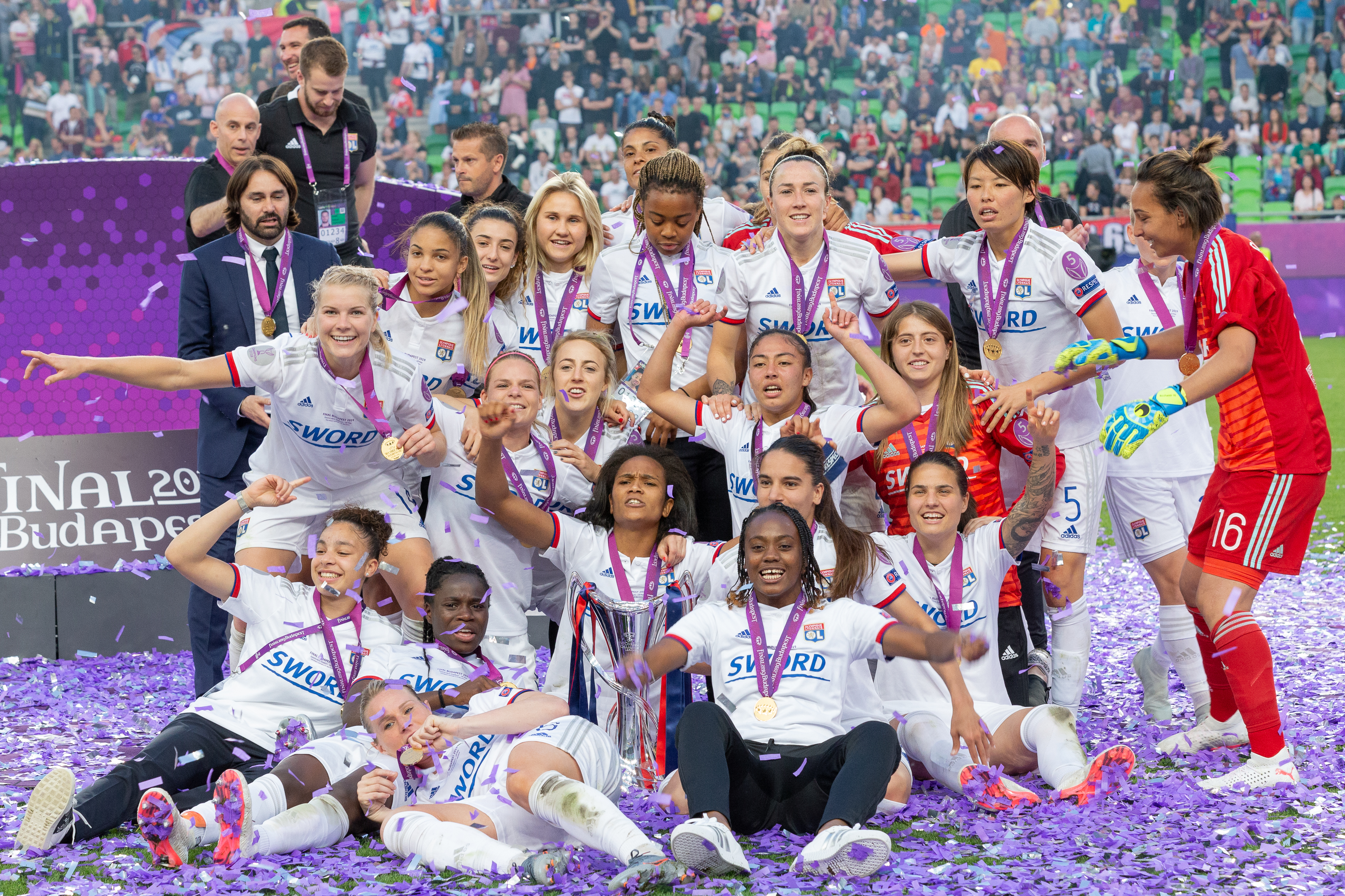 Fußball, Frauen, UEFA Women's Champions League, Olympique Lyonnais - FC Barcelona; Olympique Lyonnais feiert den erneuten Titel; Jubel, celebration